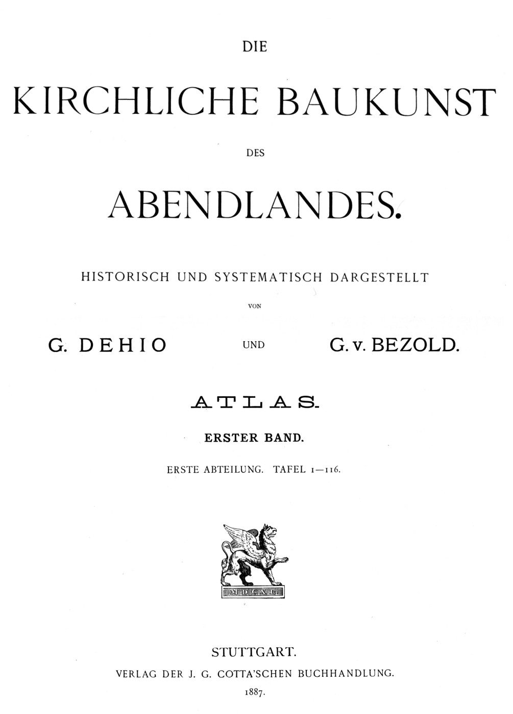 Cover of Georg Dehio / Gustav von Bezold: Kirchliche Baukunst des Abendlandes. Vol. 1 Stuttgart: Verlag der Cottaschen Buchhandlung 1887.